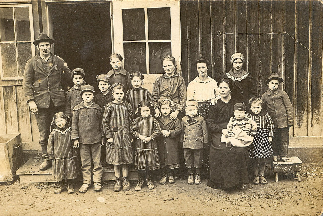 Primorski begunci pred barako v begunskem taborišču Steinklamm